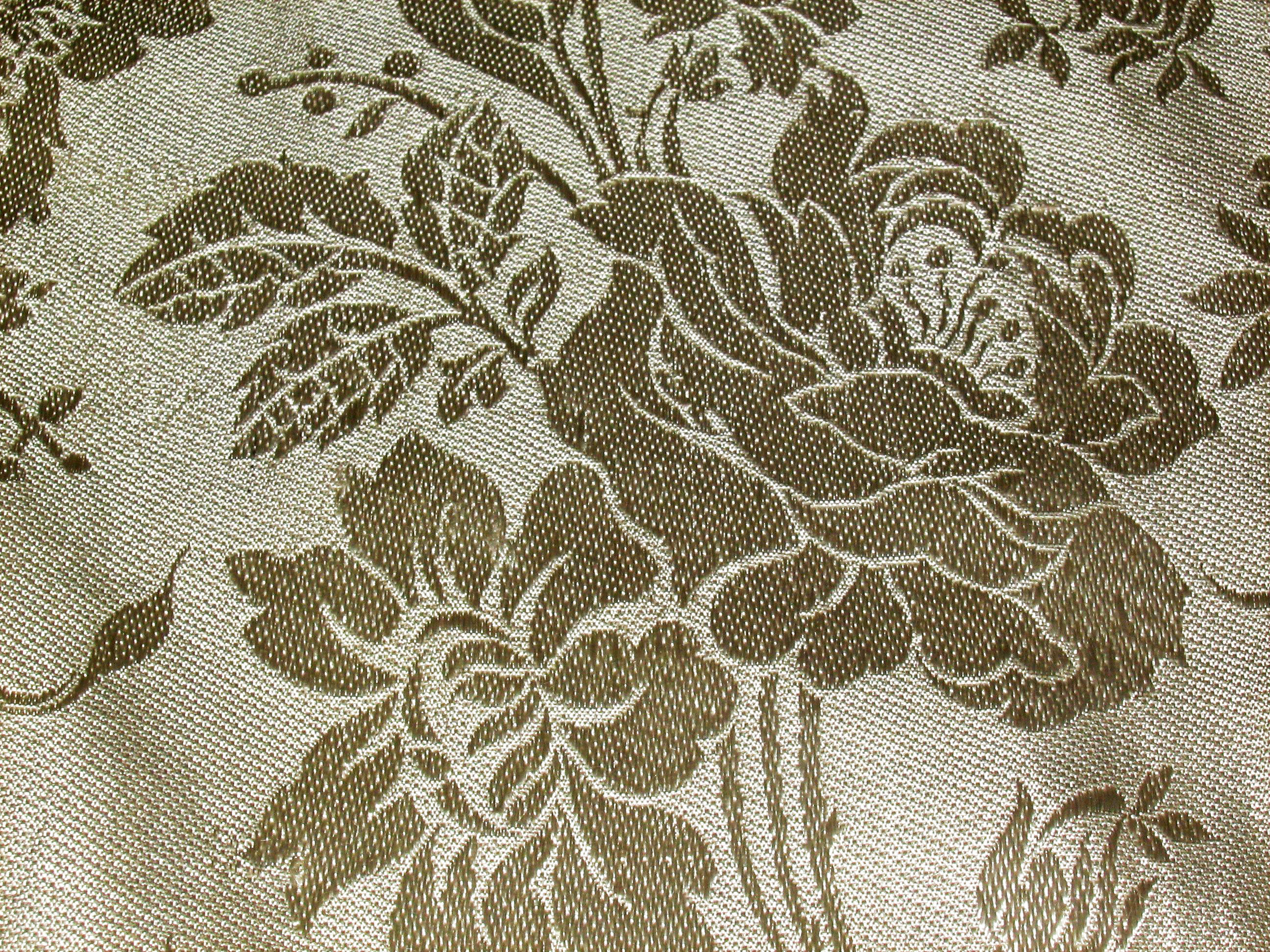 Detal ornatu skrzypcowego.